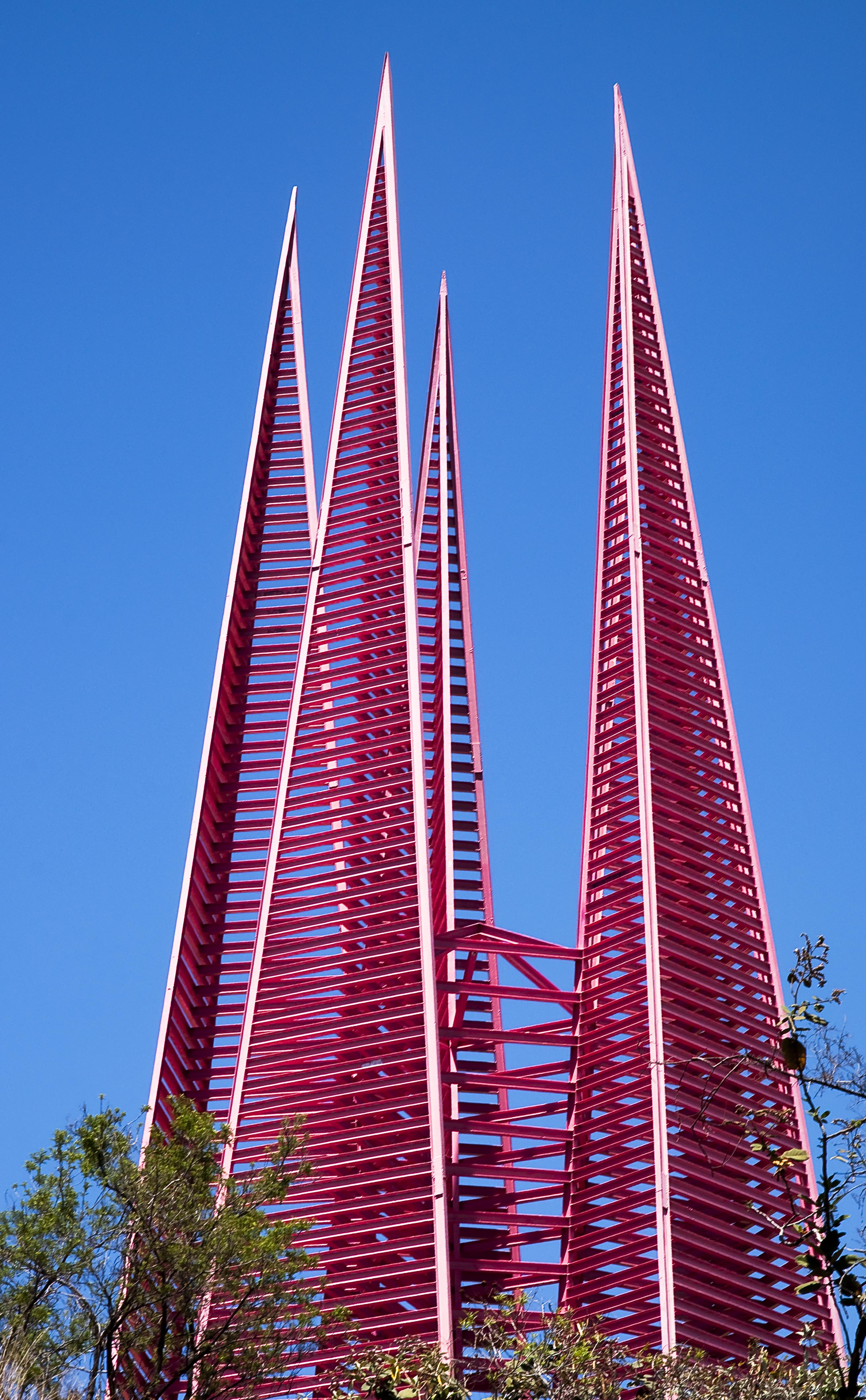 Esta estructura forma parte del paseo de las esculturas de Ciudad Universitaria. Su nombre es [como dice el título]: "Corona del pedregal" y su autor, Mathias Goeritz (escultor mexicano alemán que ideó obras como las torres de satélite y la ruta de la amistad, entre otras). Nikon D90, 70 mm. Tomada durante el fototour de foco fijo (sábado 20 de marzo) organizado por el grupo Dflickr.